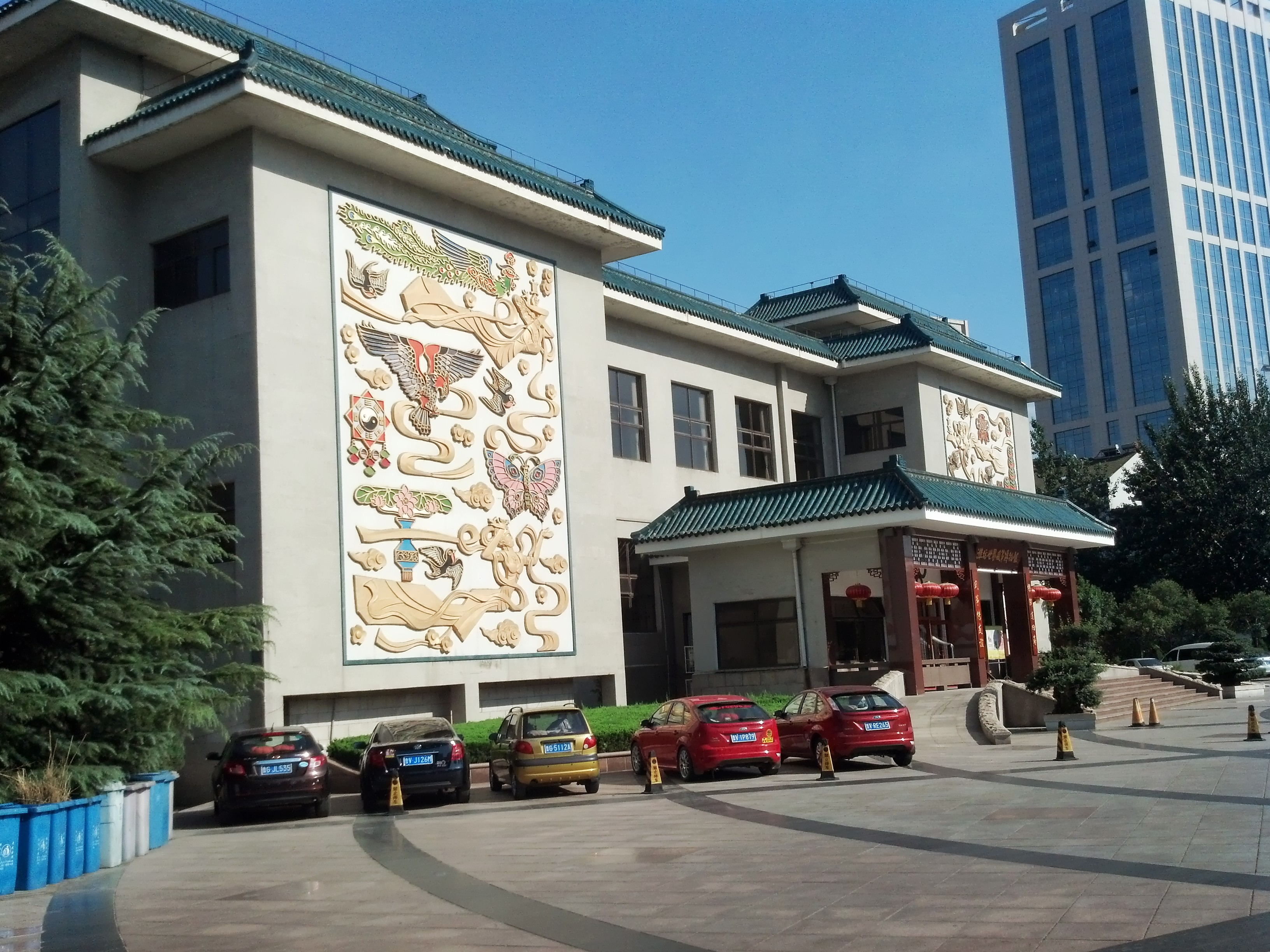 风筝博物馆